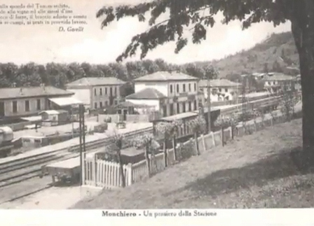 Monchiero - Stazione ferrotranviaria